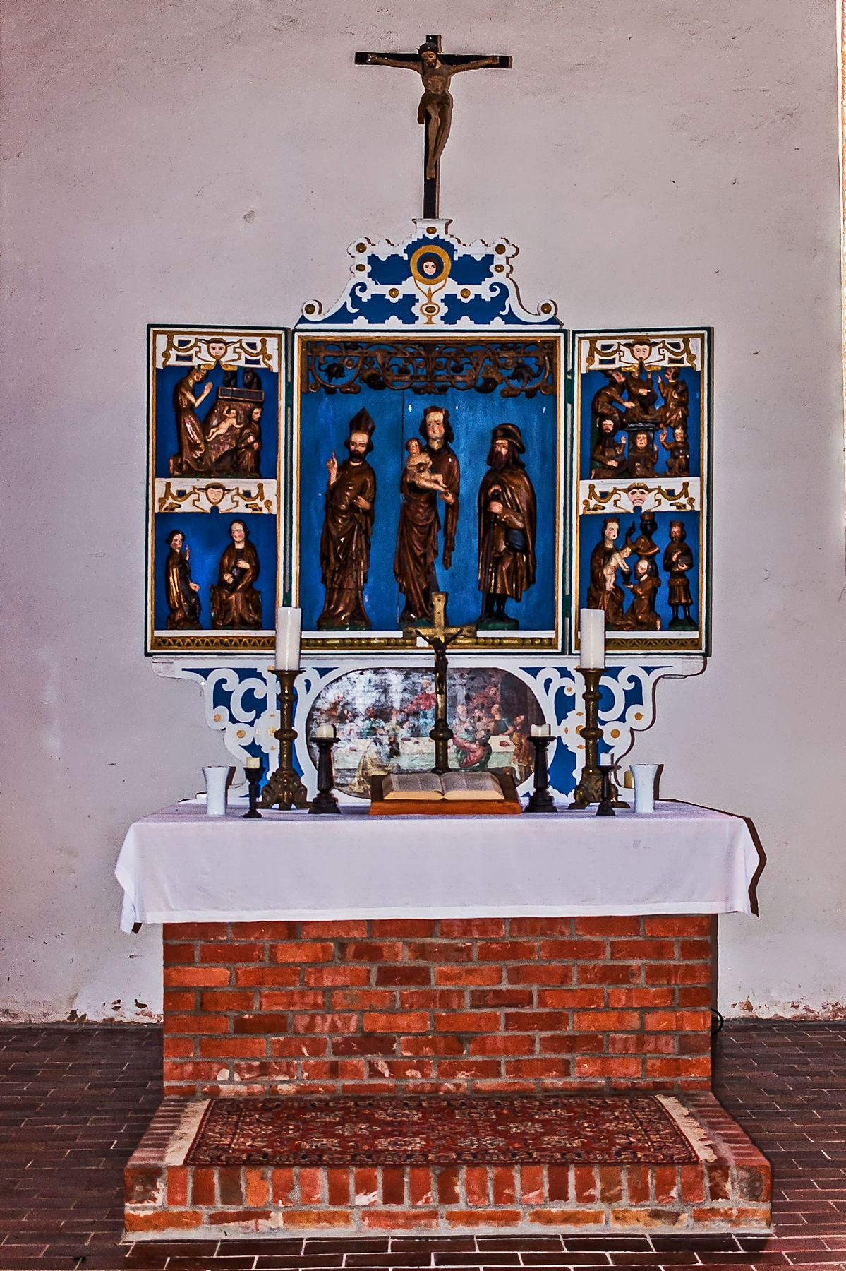 Flügelaltar der Dorfkirche Biesenbrow. Der gotische Flügelaltar stammt aus der Mitte des 15. Jahrhunderts. Im Schrein des Altars steht Maria zwischen zwei Heiligen. Abweichend von sonstigen Darstellungen hält Maria das Jesuskind rechts im Arm.